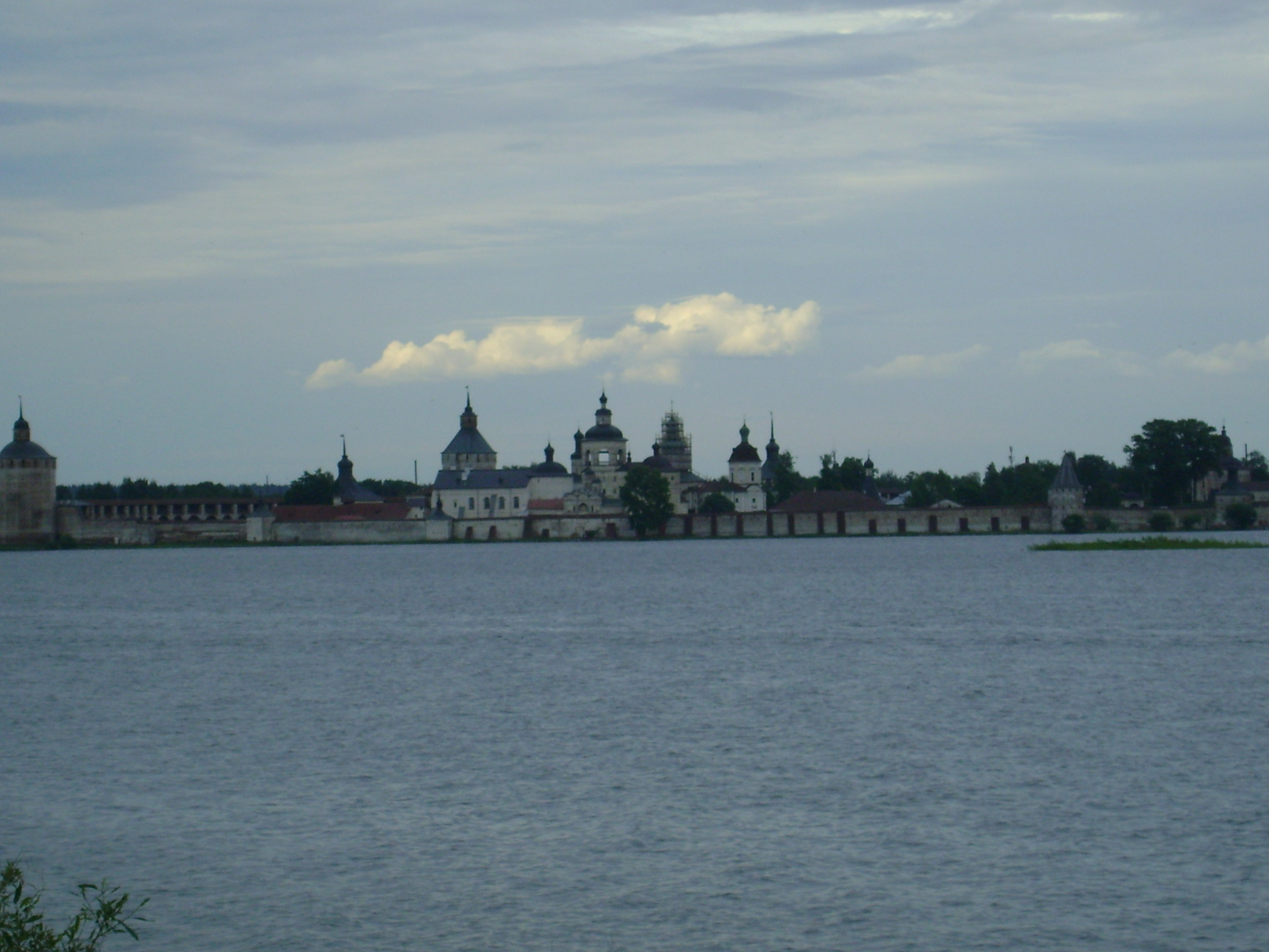 Вид на Кирилло-Белозерский монастырь через Сиверское озеро